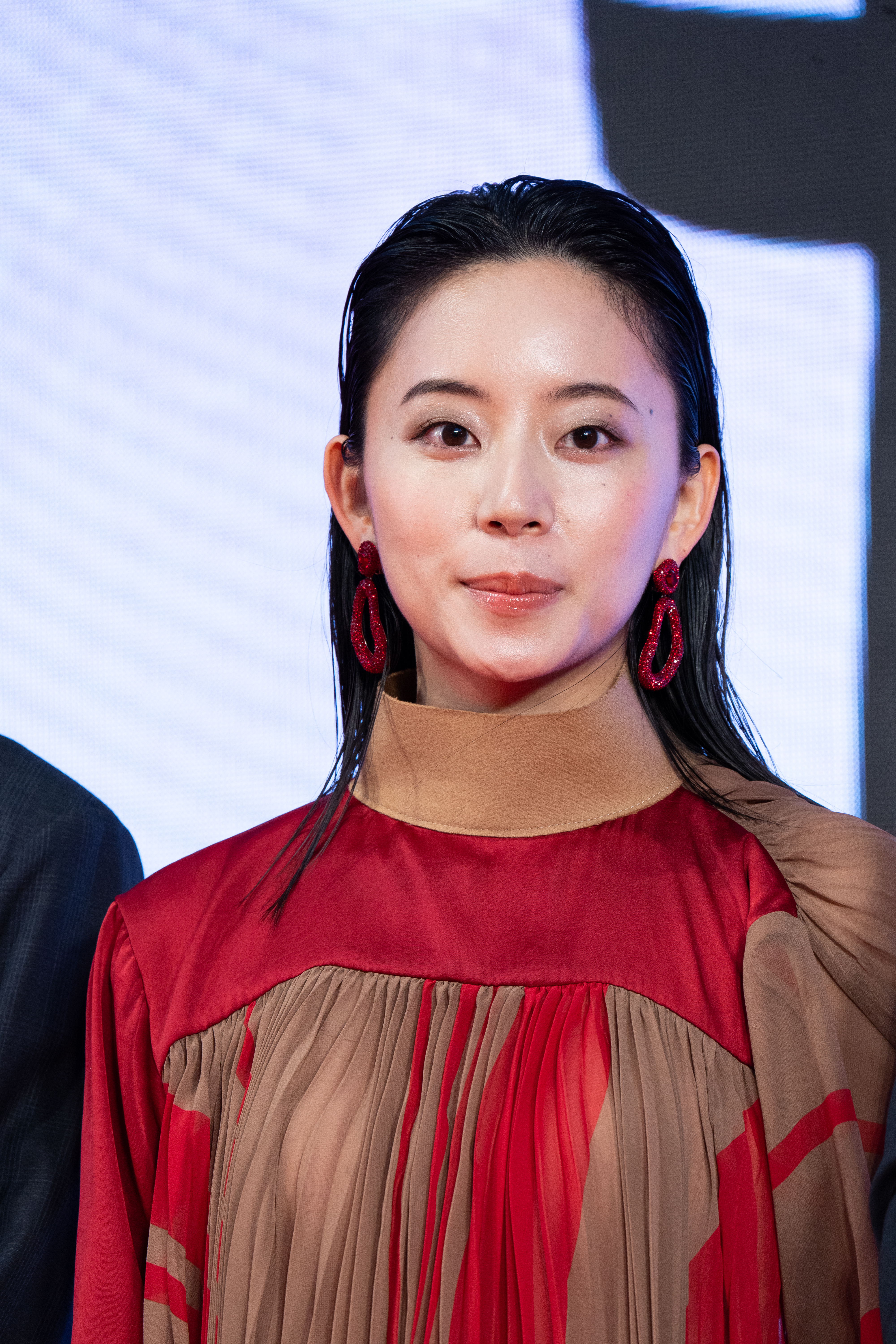 第32回 東京国際映画祭 オープニングセレモニー 大西礼芳 (花と雨)